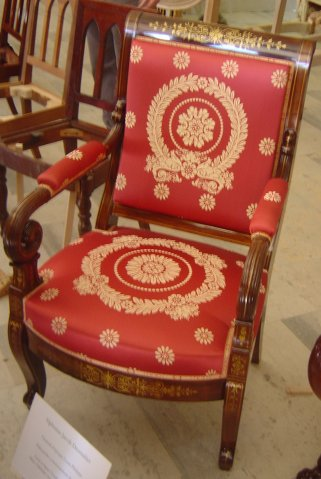 Chaise Alphonse Jacob Desmalter